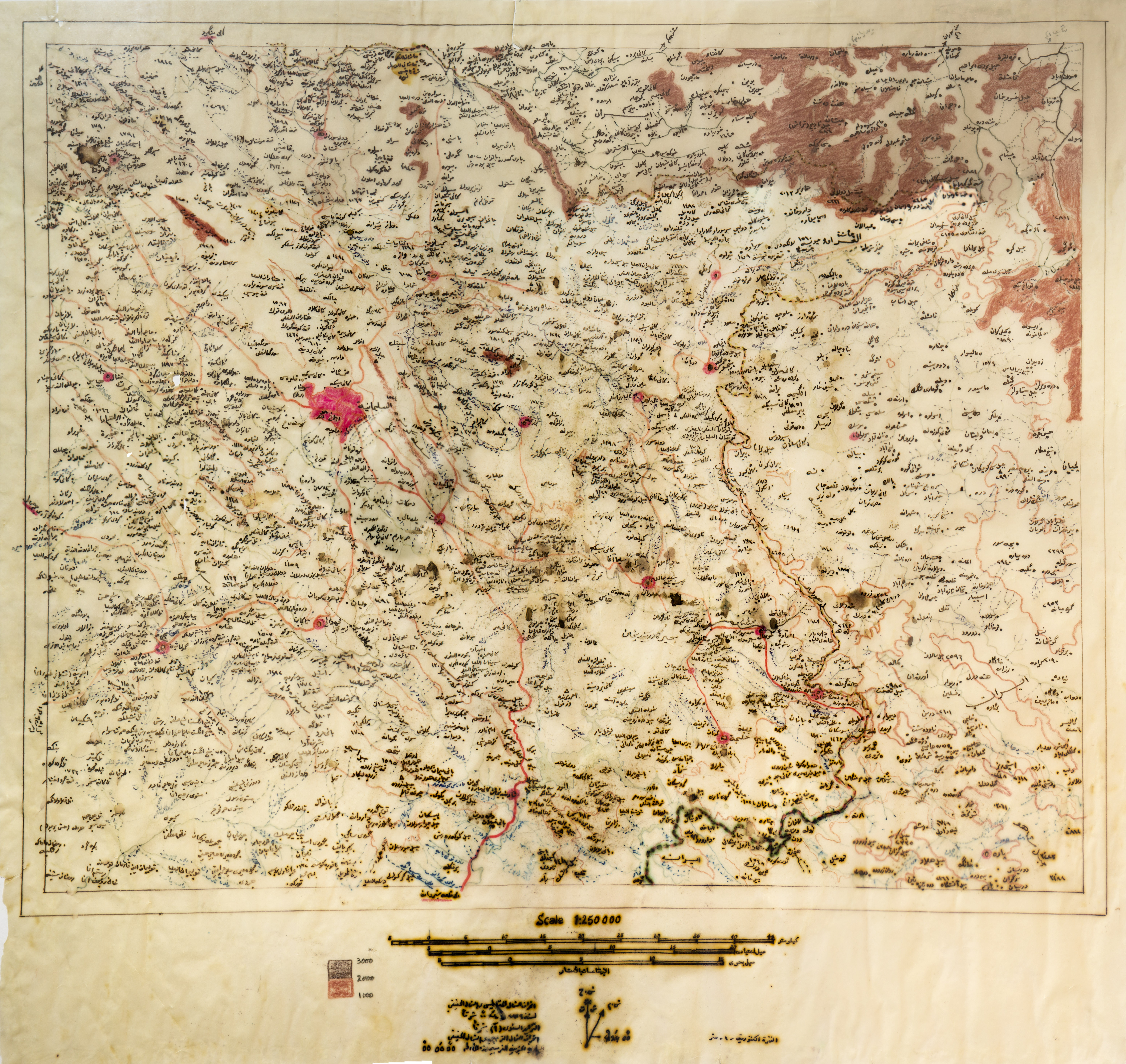 کوردی: نەخشەی پارێزگای سلێمانى بە قەڵەمی مامۆستا کەمال موکرجی لە ماوەى ھەشت ساڵ کارکردندا کێشراوە.